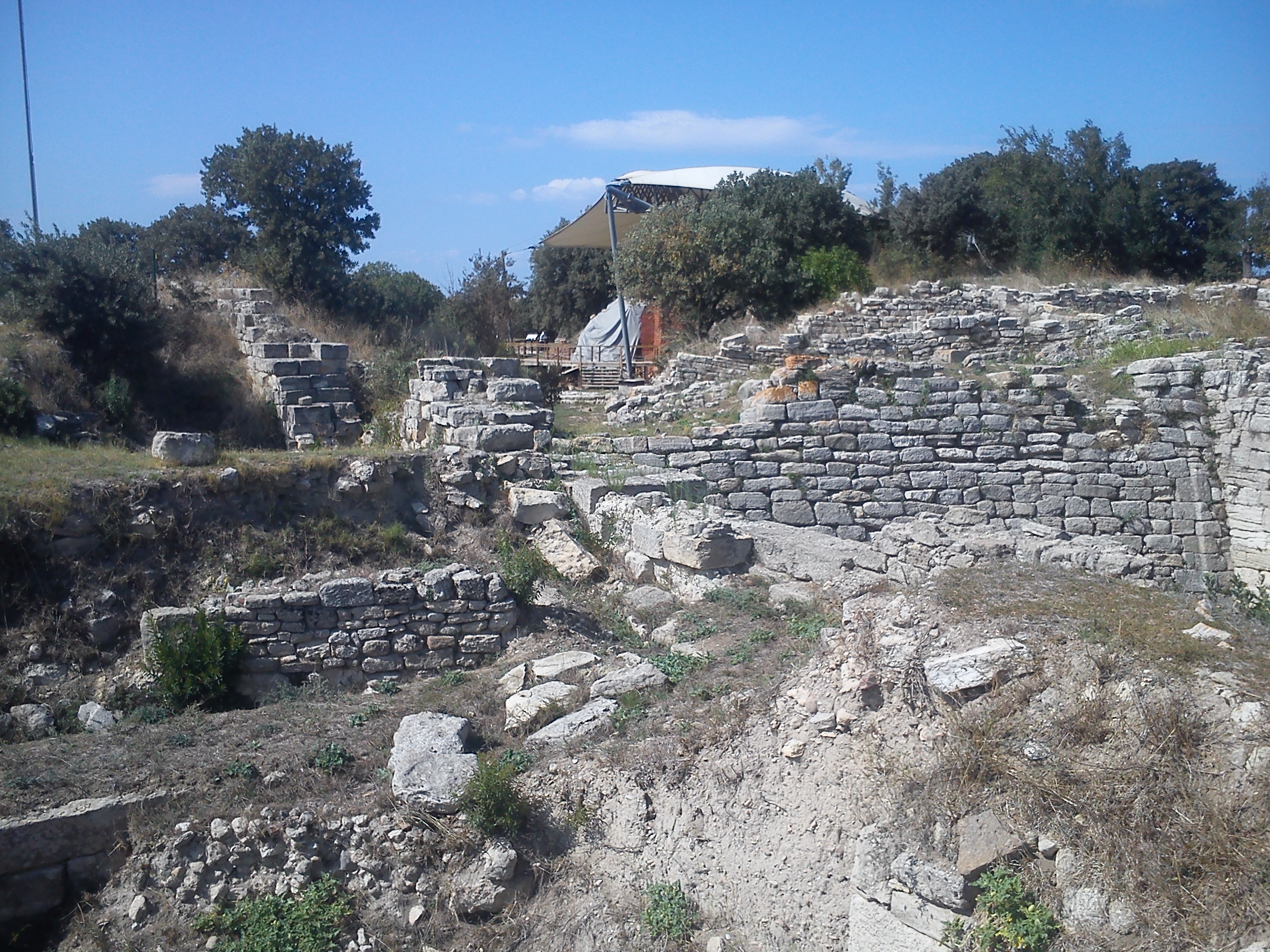 Troja